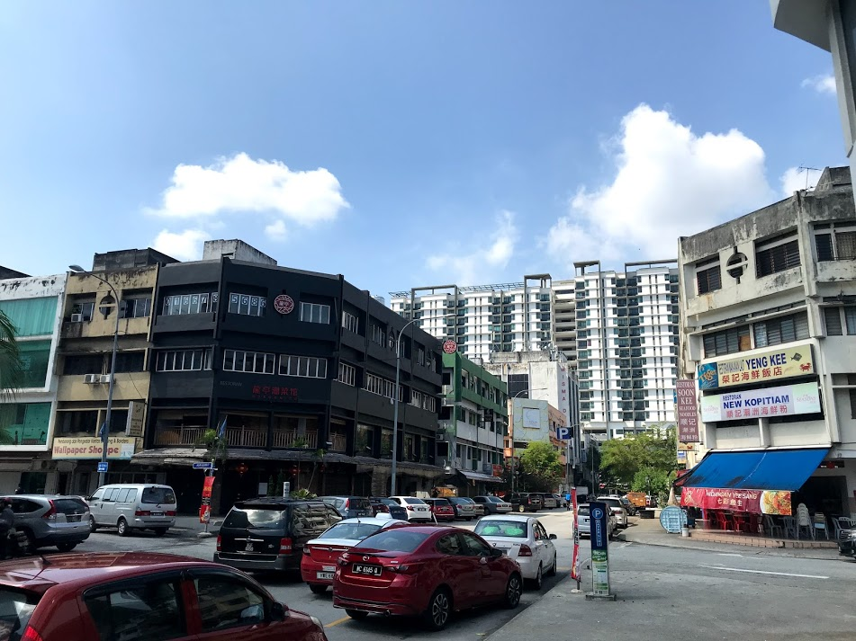 典型吉隆坡商業區街景